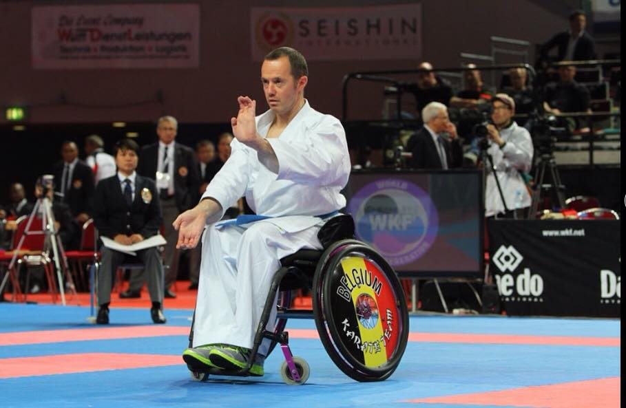 Franck Duboisse, athlète belge exécutant Suparimpei